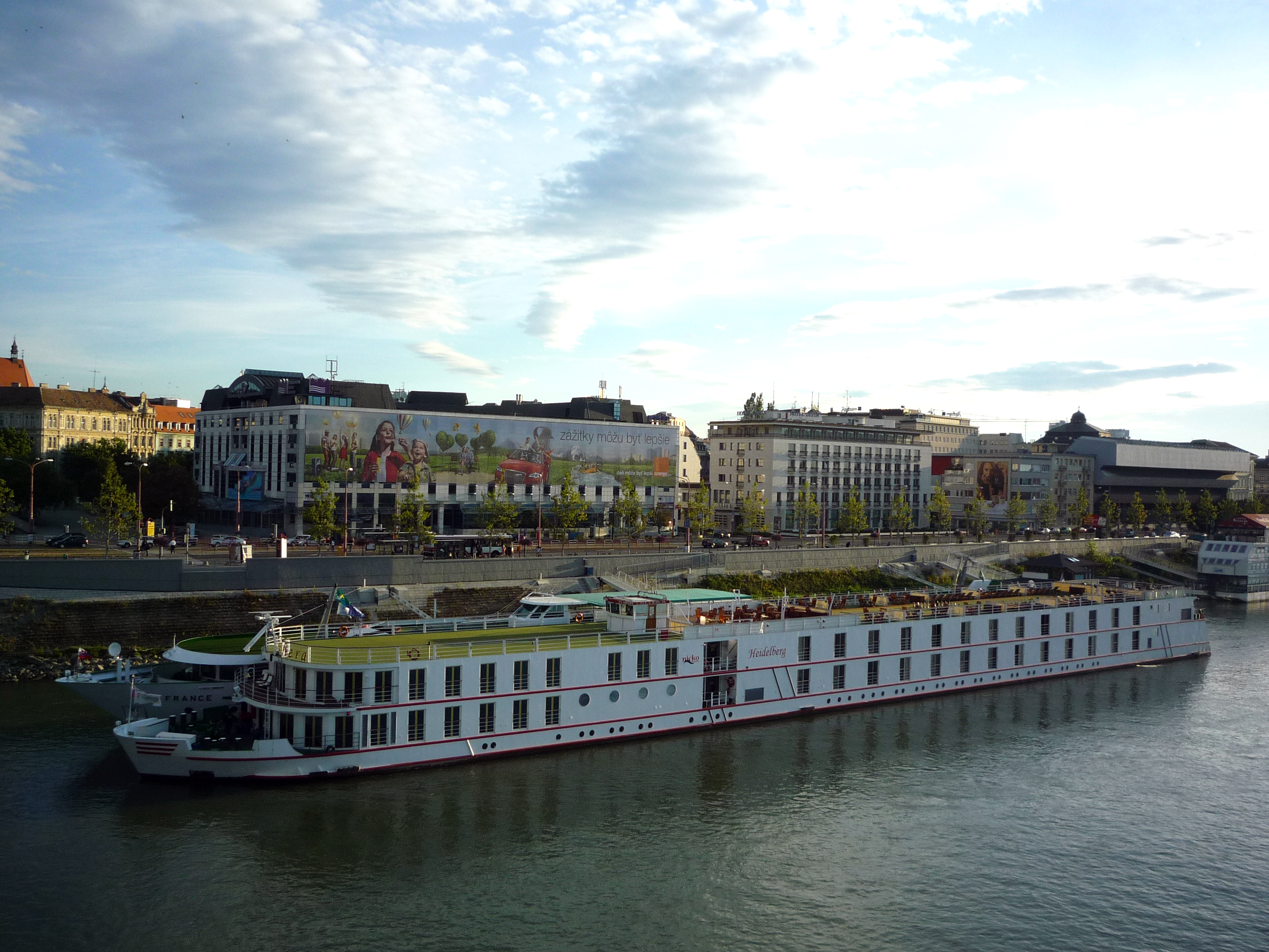 Flusskreuzfahrtschiff Heidelberg am Anleger in Bratislava